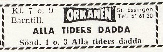 Biografannons från 1948